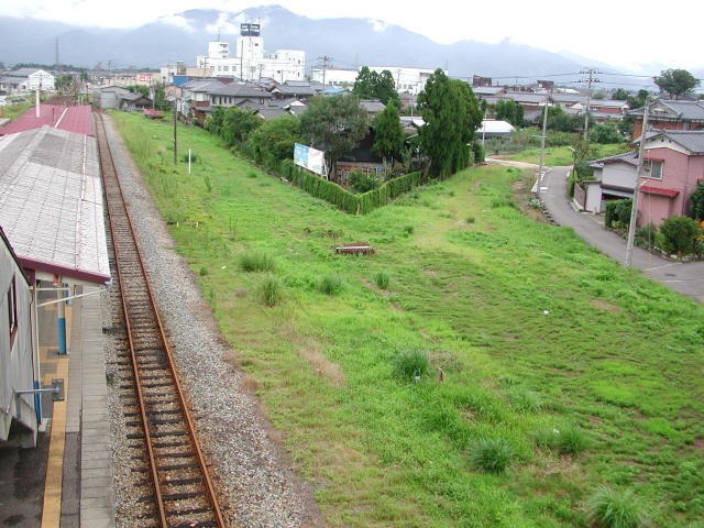 JR五泉駅・蒲鉄線跡